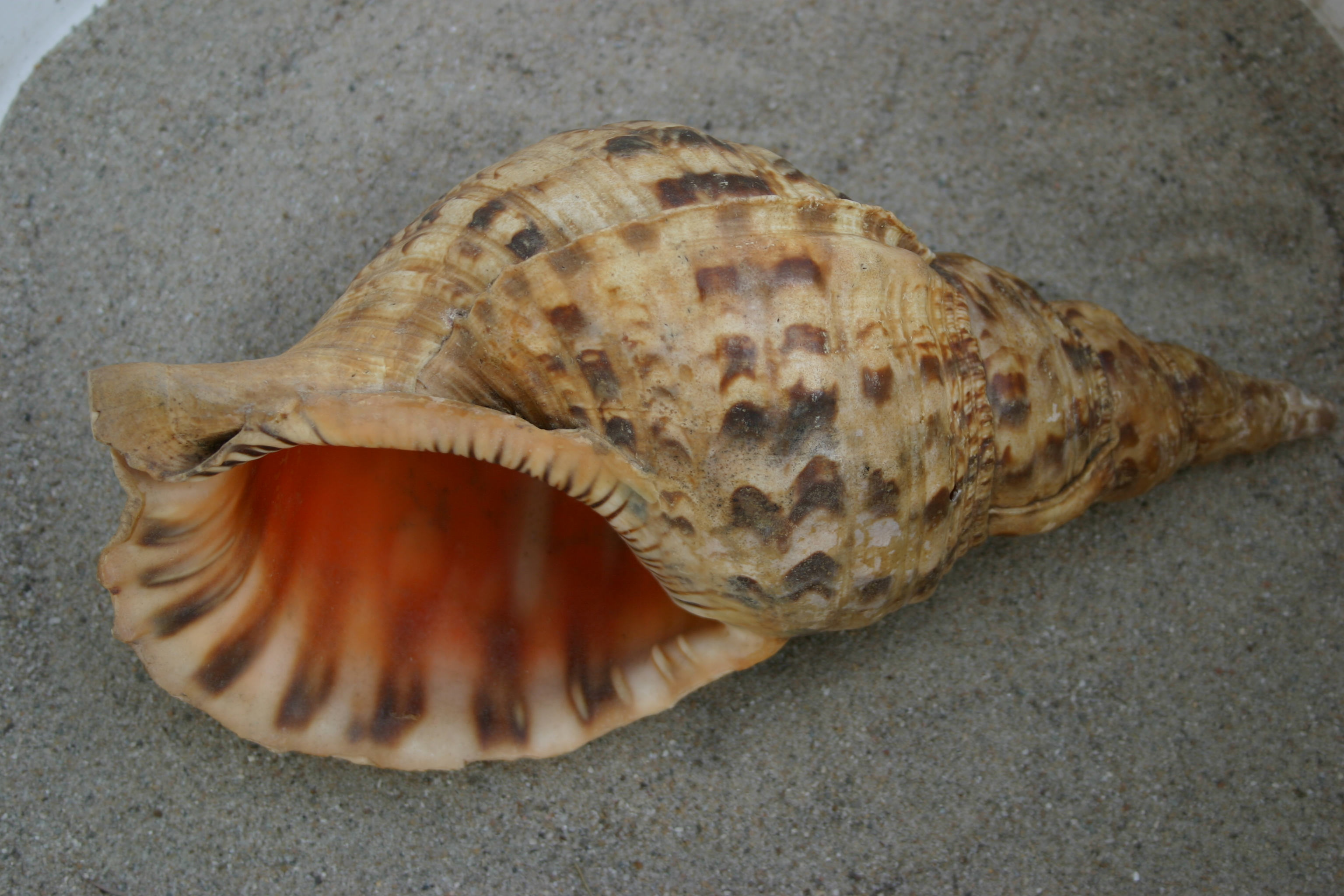 Charonia tritonis